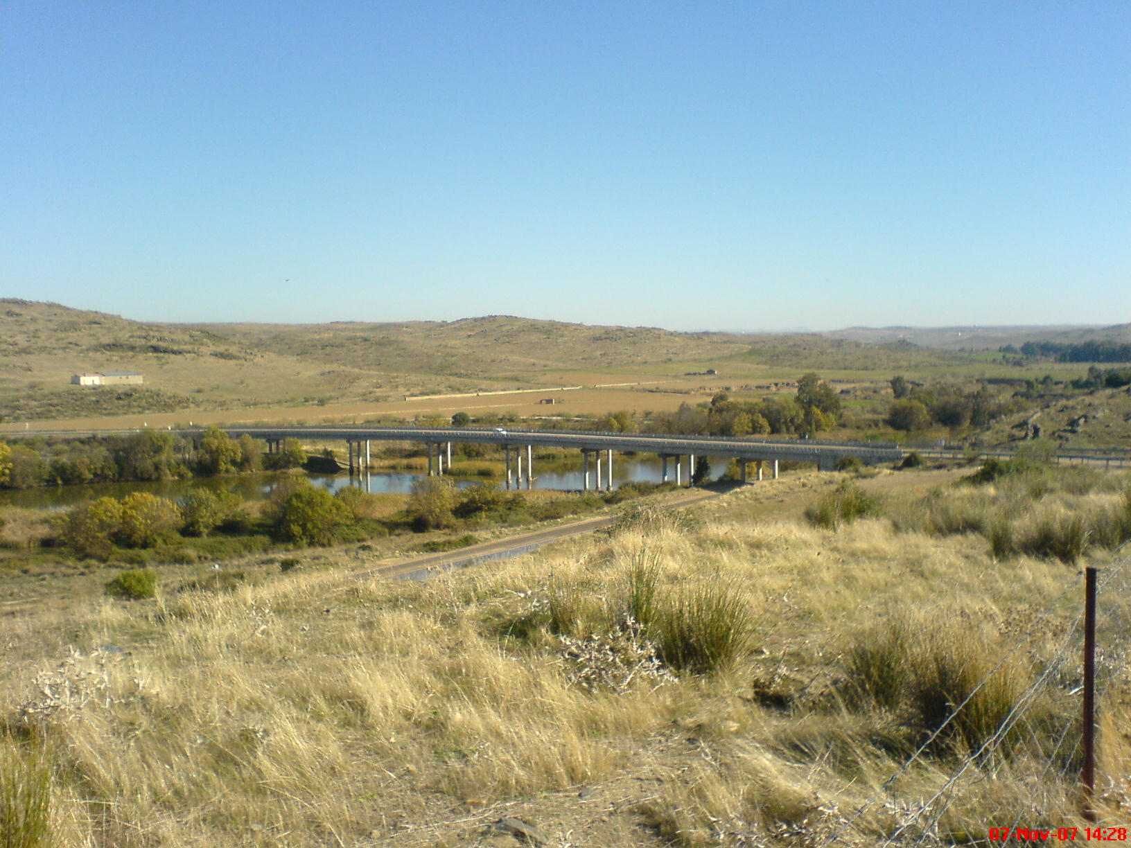 Puente sobre el río Zújar en la EX-115